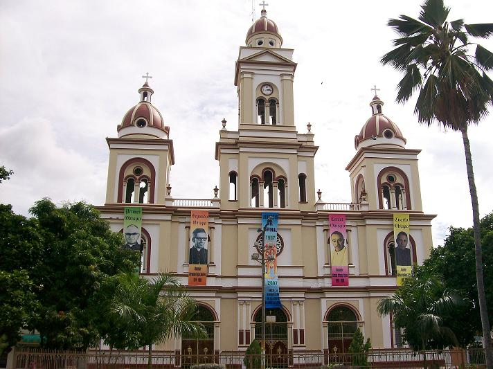 Catedral de El Espinal - Tolima